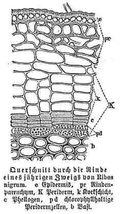 Kork - Querschnitt durch die Rinde eines jährigen Zweigs von Ribes nigrum